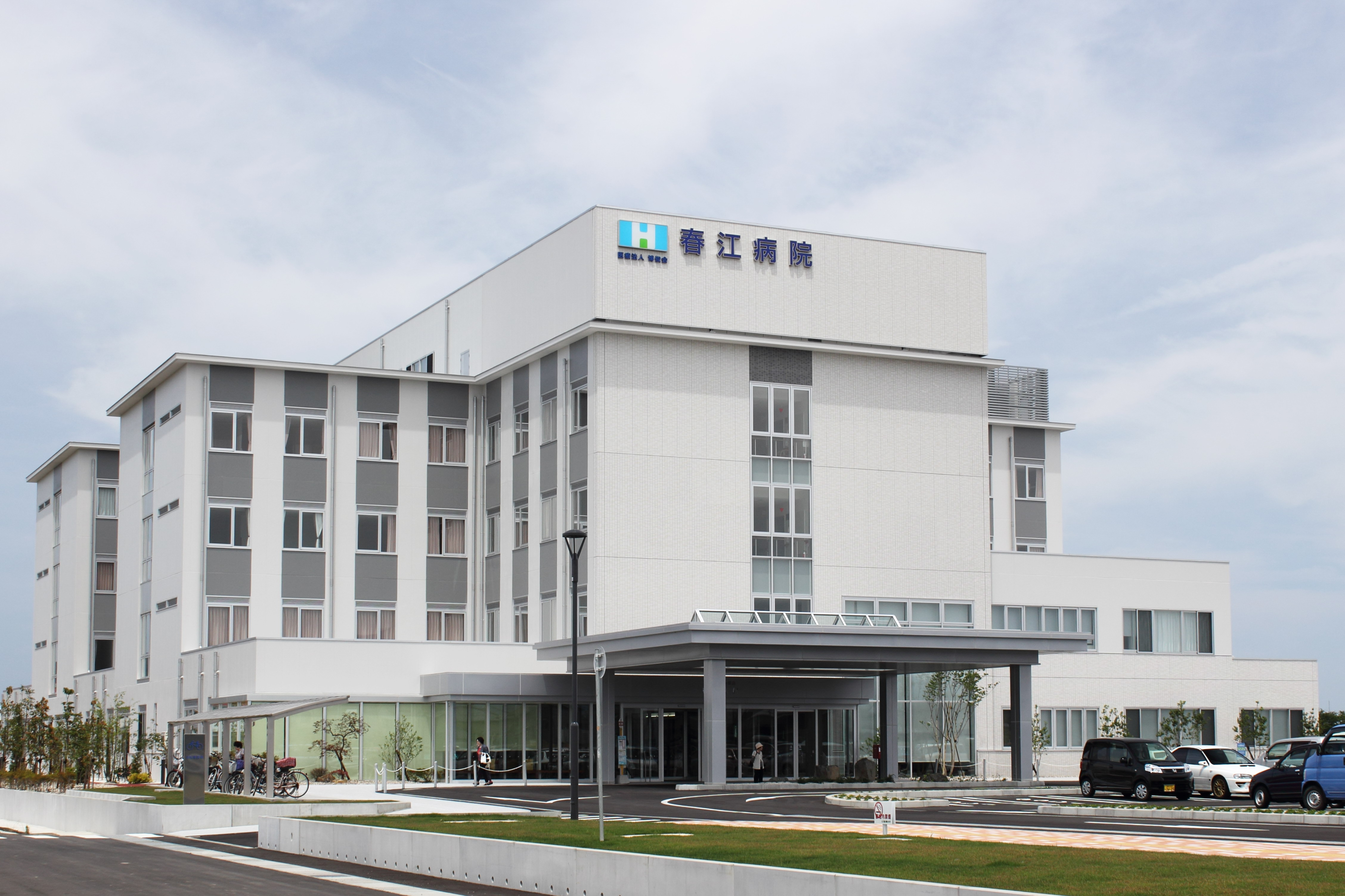 春江病院（2016年6月新築移転後）